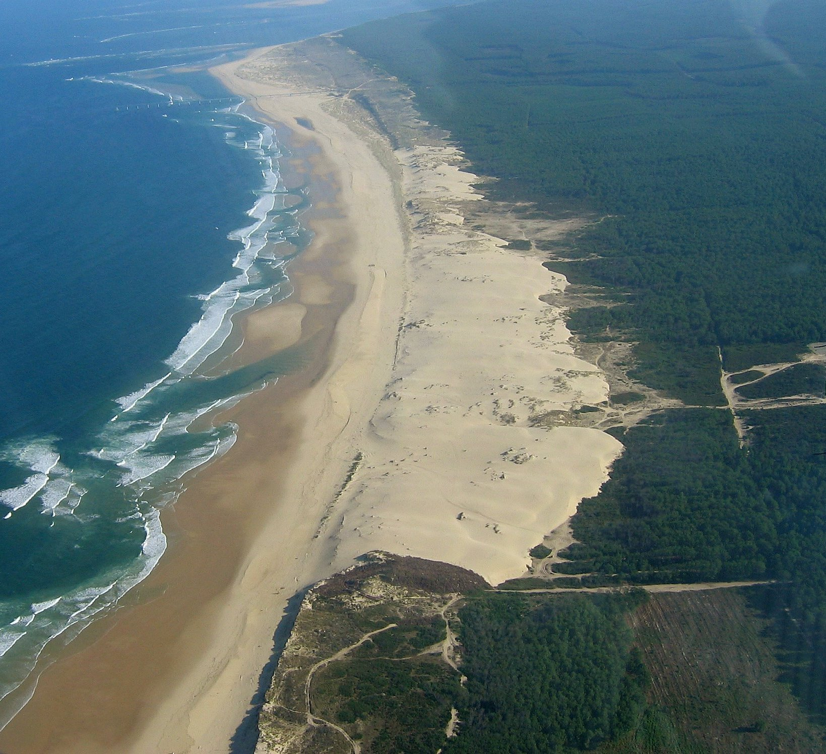 La dune du Trencat à La Teste de Buch, un exemple de dune non stabilisée.